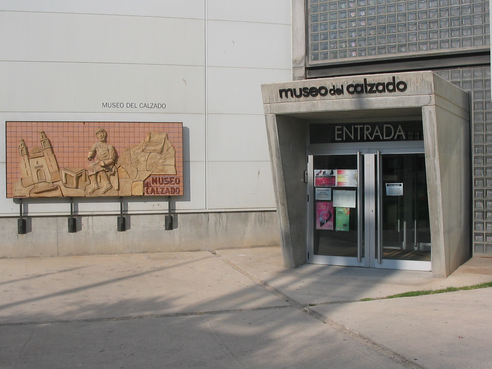 Fotografía de la entrada del Museo del Calzado de Elda, Alicante, España.